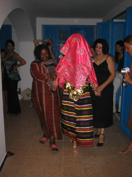 Mariée de Djerba portant un r'dé traditionnel